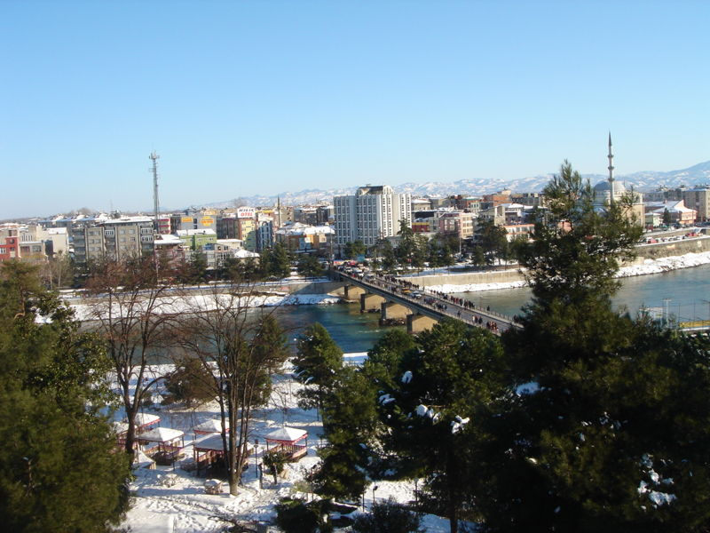 Samsun ili, Çarşamba ilçesinin merkezi.